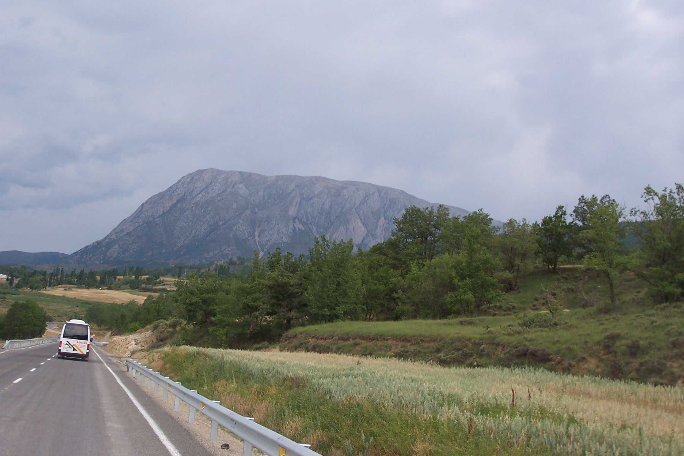 El Turbón.